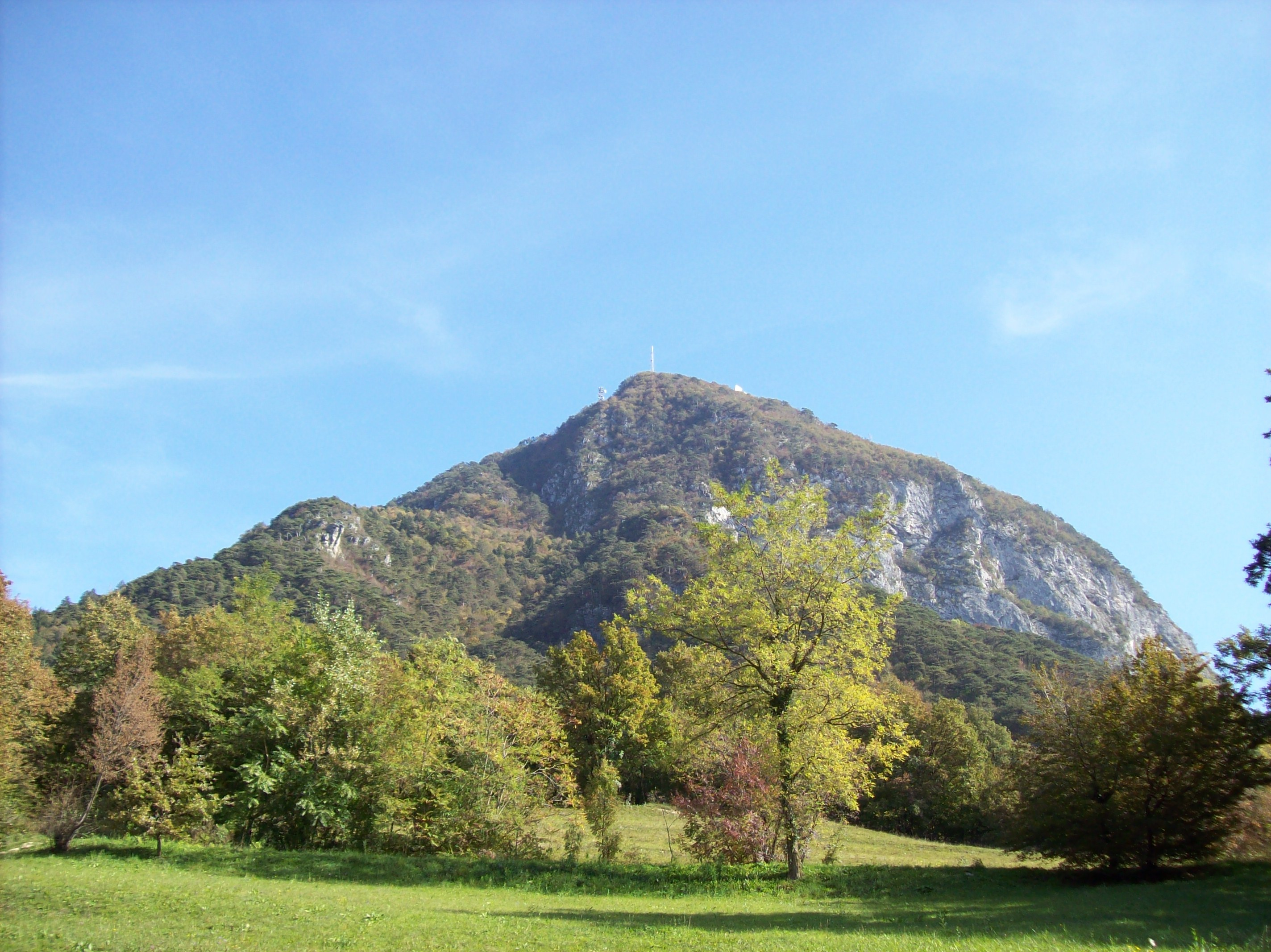 Tolmezzo (UD), il Monte Strabut